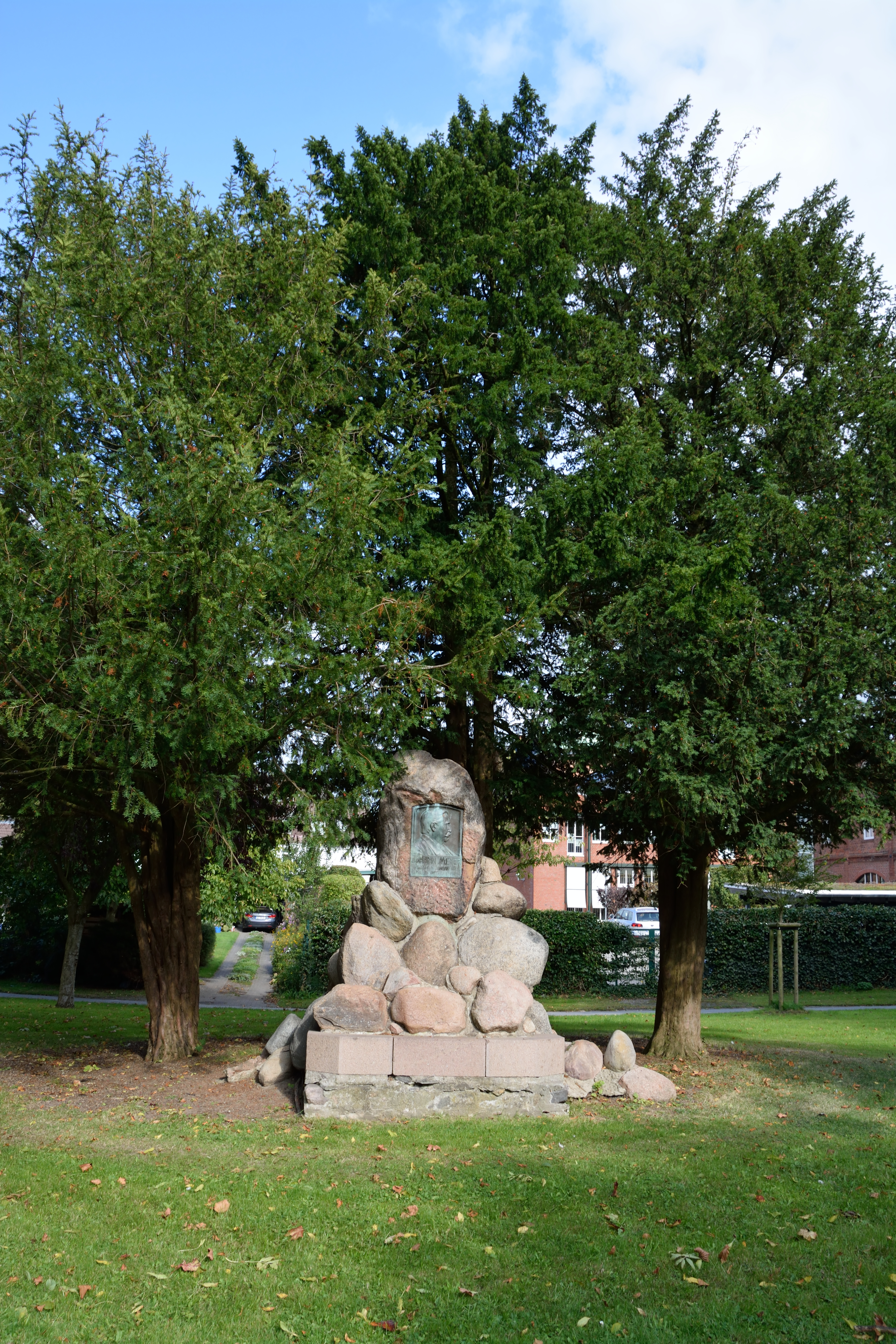 Impressionen aus dem Stadtpark Wilster Denkmal für Johann Meyer